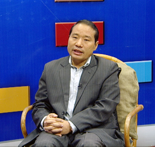 नेपाली: Barsaman pun